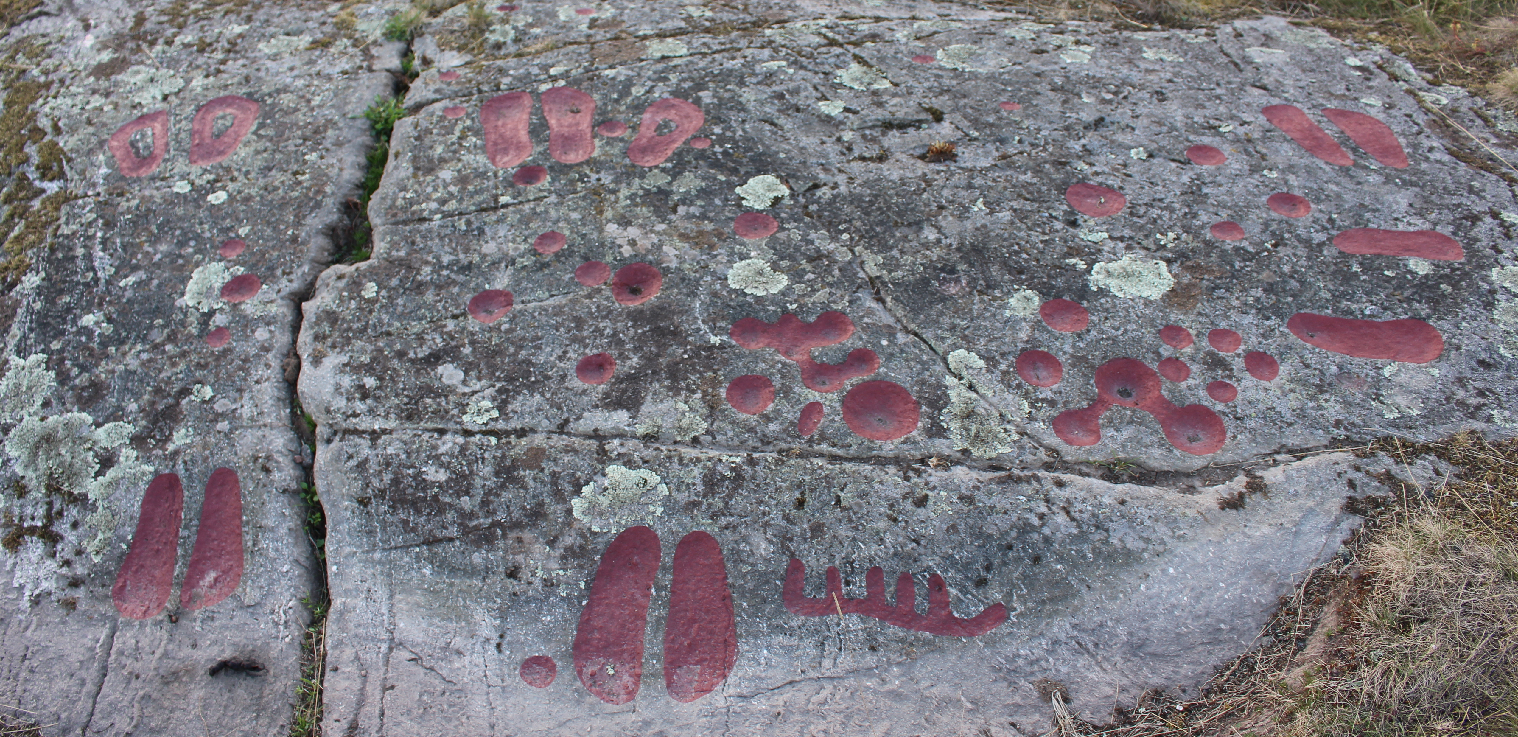 Hällristning nära Otterstads kyrka (RAÄ-nummer Otterstad 101:4) på Kållandsö, Otterstads socken, Kållands härad, Lidköpings kommun, f.d. Skaraborgs län, Västergötland, Västra Götalands län, Sverige.